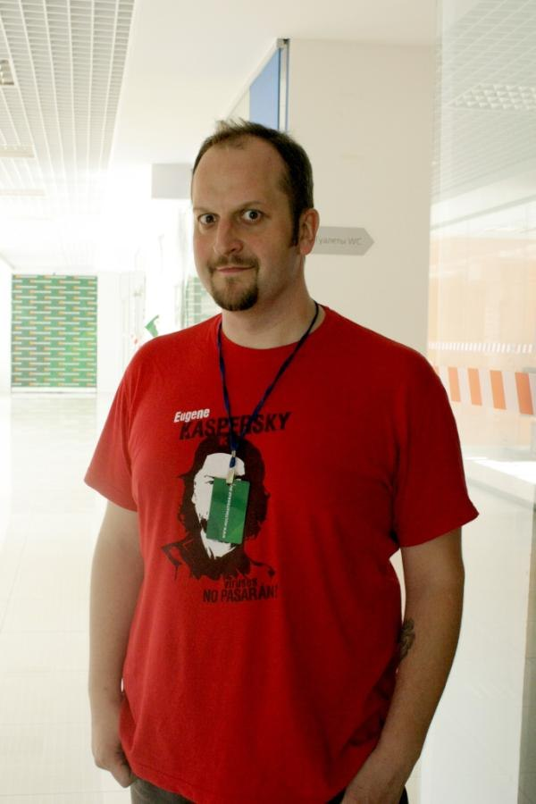 Директор Мультиматографа Максим Петряев